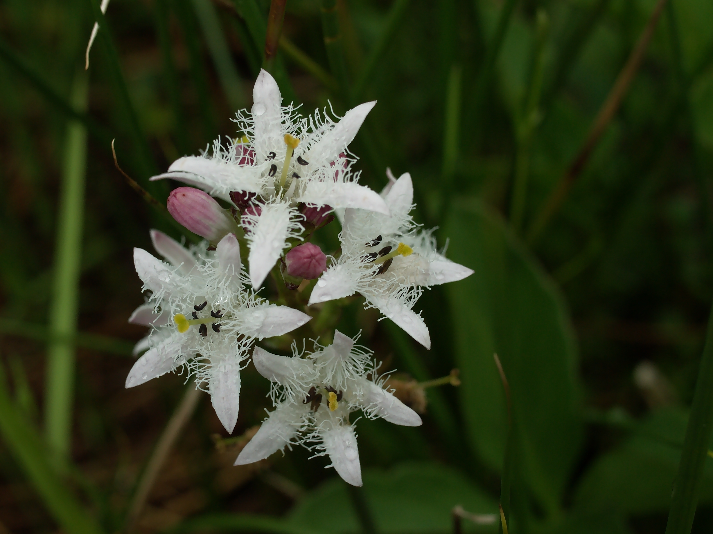 Fieberklee (Menyanthes trifoliata), Braunlauf, Ostbelgien